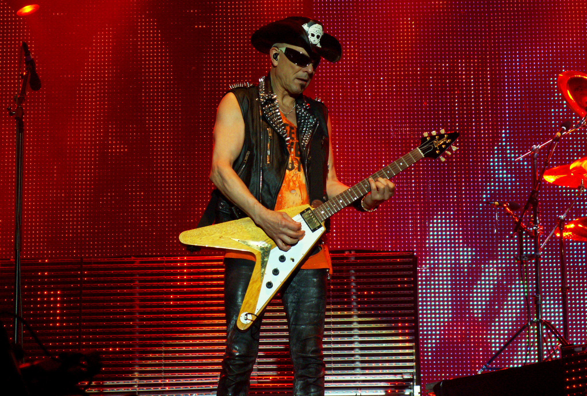 Rudolf Schenker au Hellfest 2011